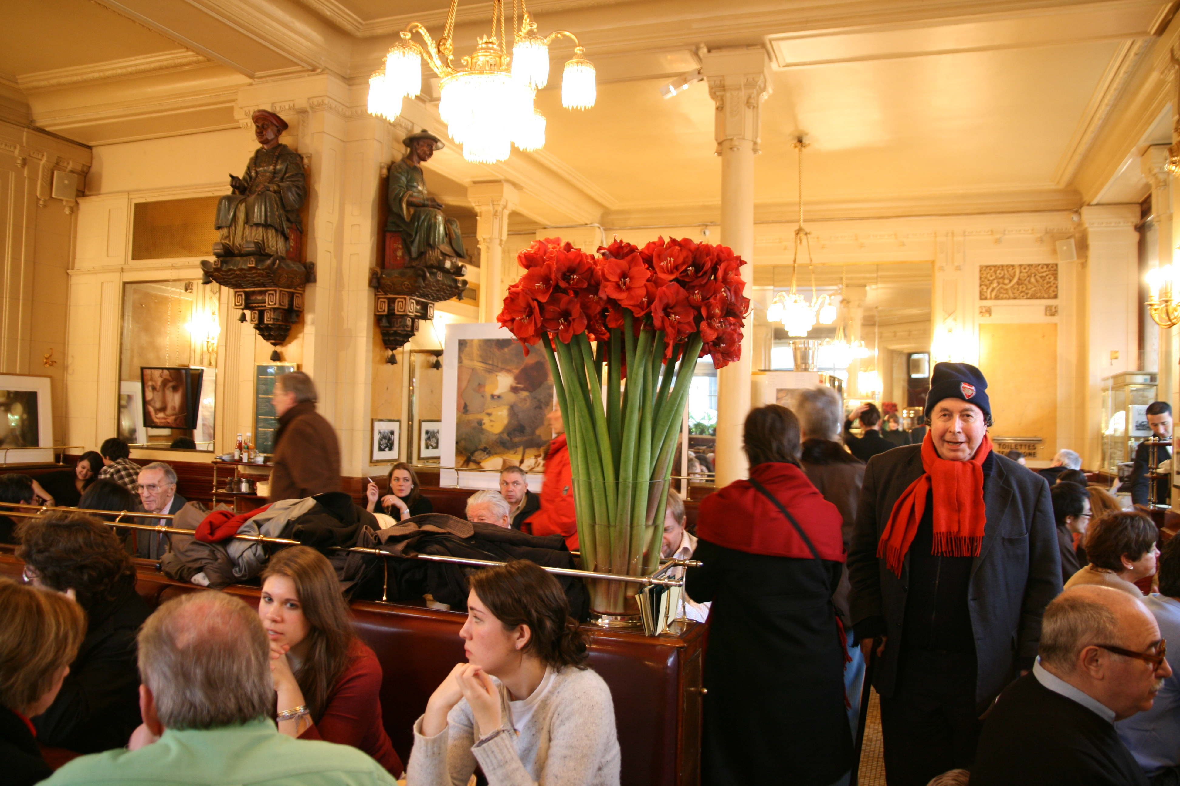 Intérieur du café parisien Les Deux Magots.